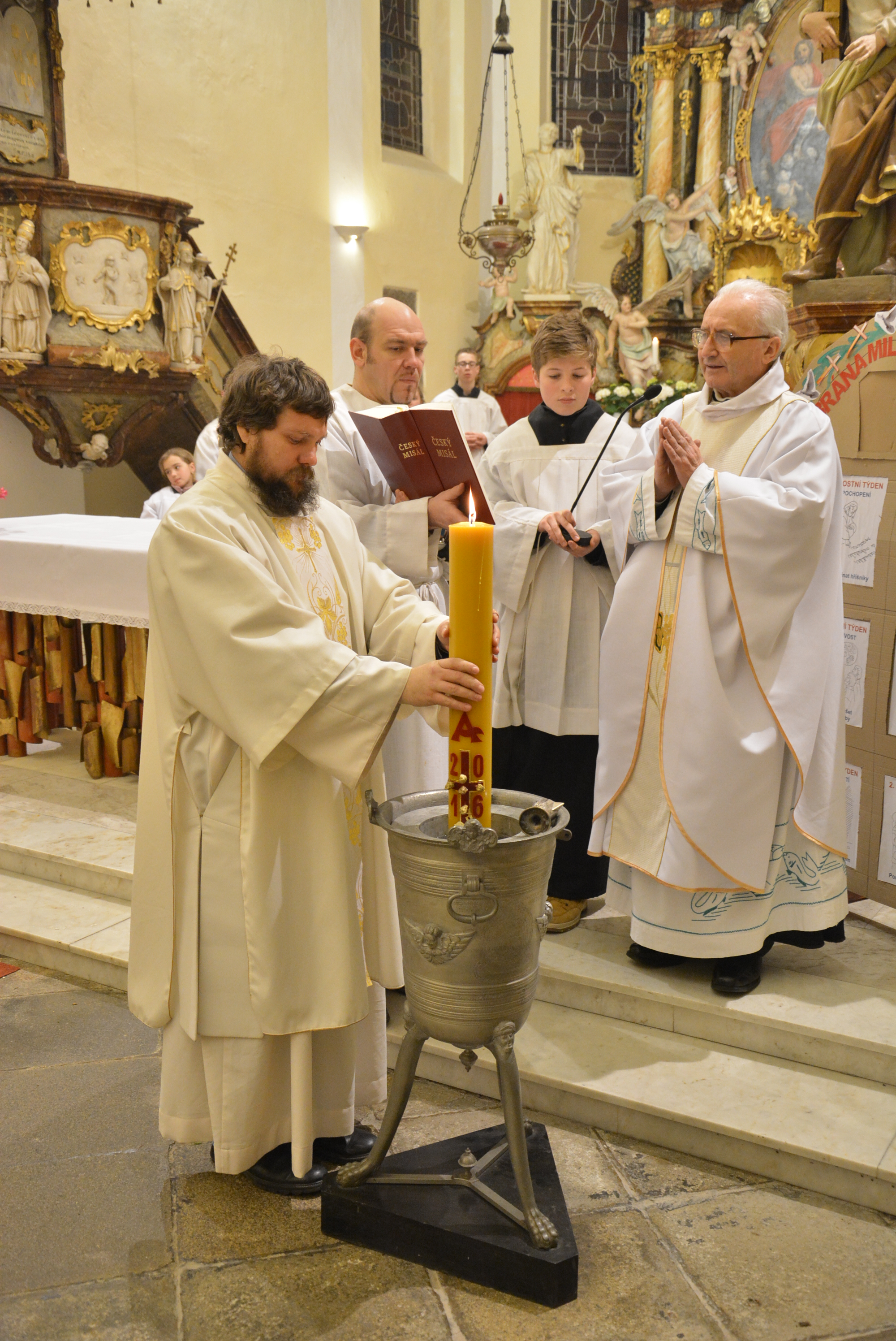 svěcení křestní vody o Velikonocích 2016 v kostele v Chýnově